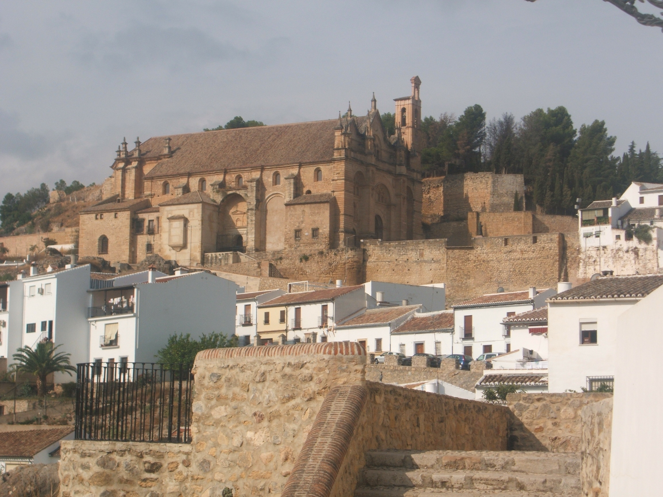 Alcazaba de Santa Maria, Castillo